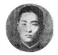 장덕준, 한국의 독립운동가 겸 언론인